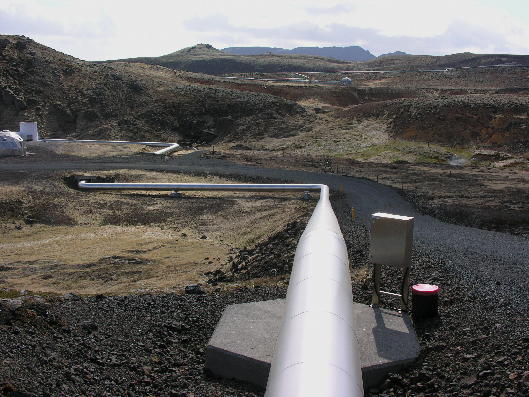 Iceland, Nesjavallavirkjun